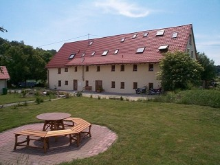 Das Buddhistische Zentrum Ravensburg im Vogelhäusle 1, 88213 Ravensburg